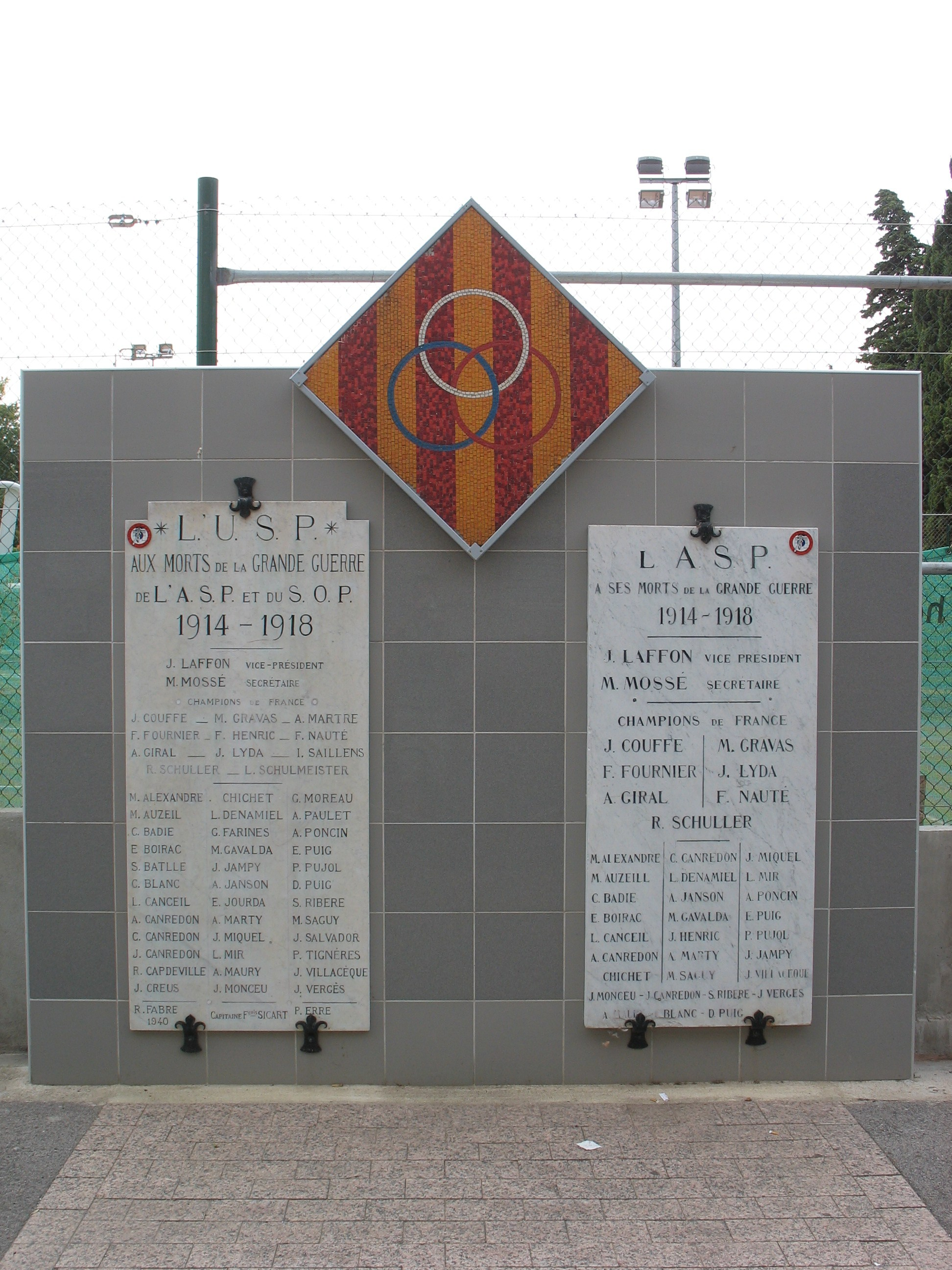 Monuments aux morts du Stade Aimé-Giral de Perpignan